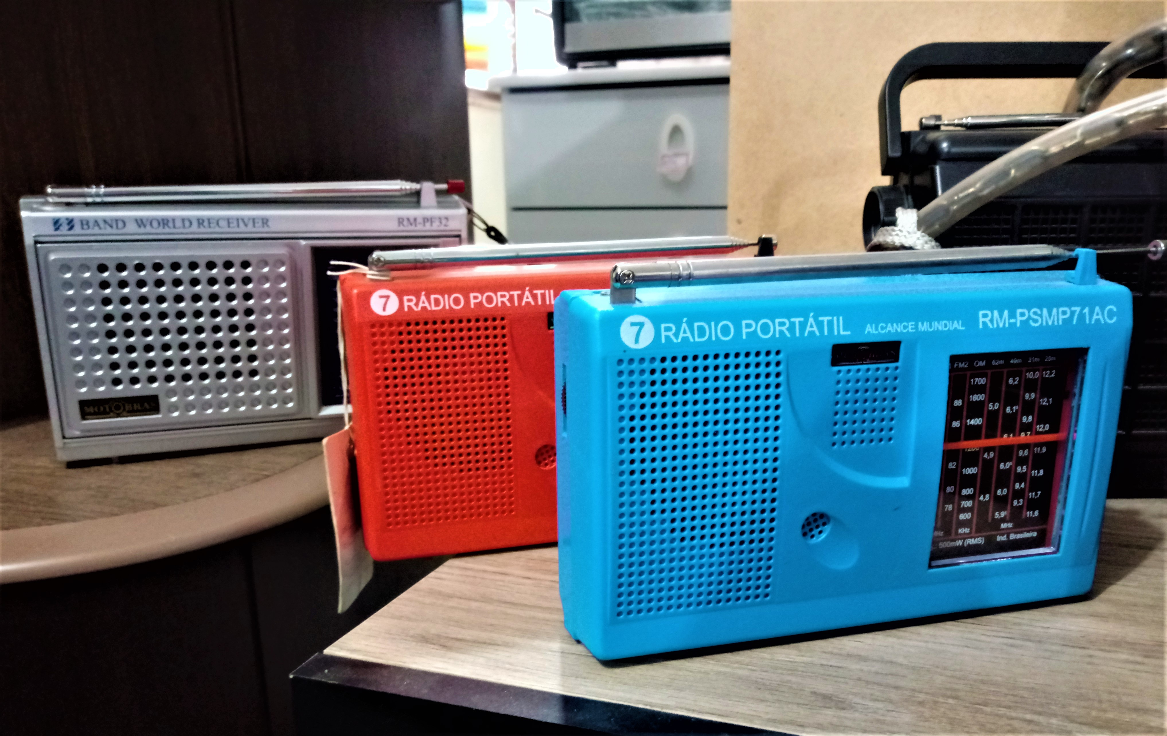 Rádios coloridos da fabricante brasileira Motobrás.